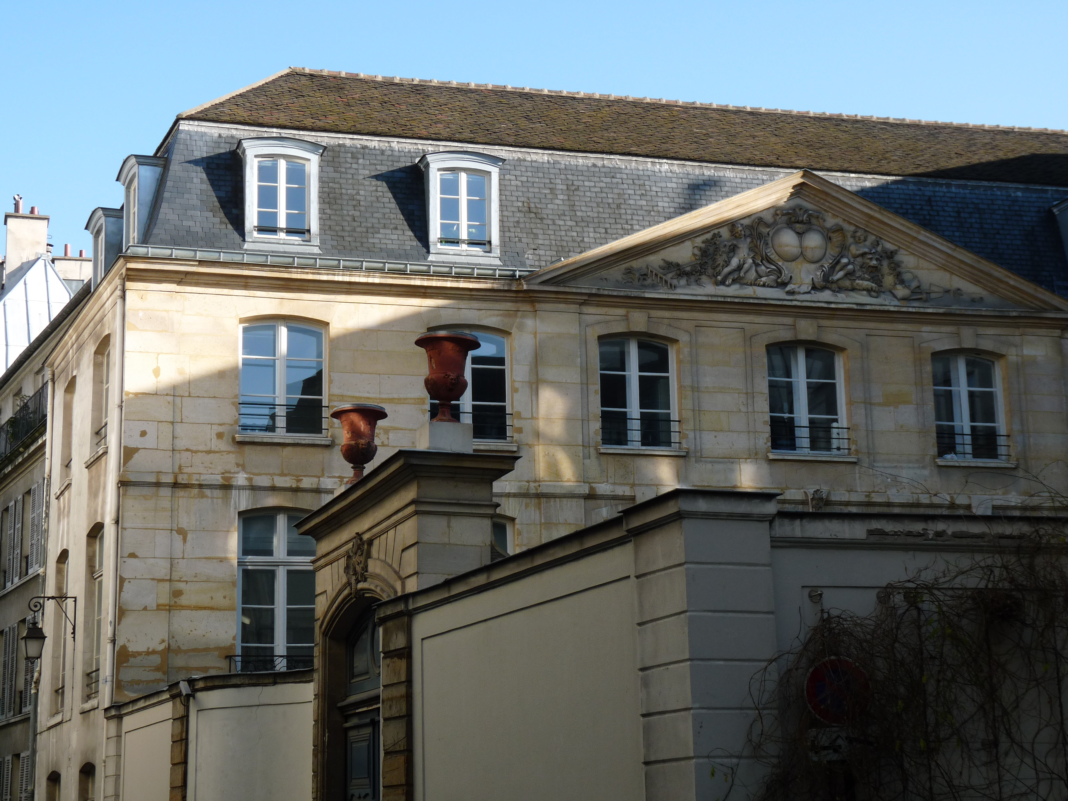 L'hôtel Thiroux de Lailly à Paris, vue depuis la rue de Montmorency